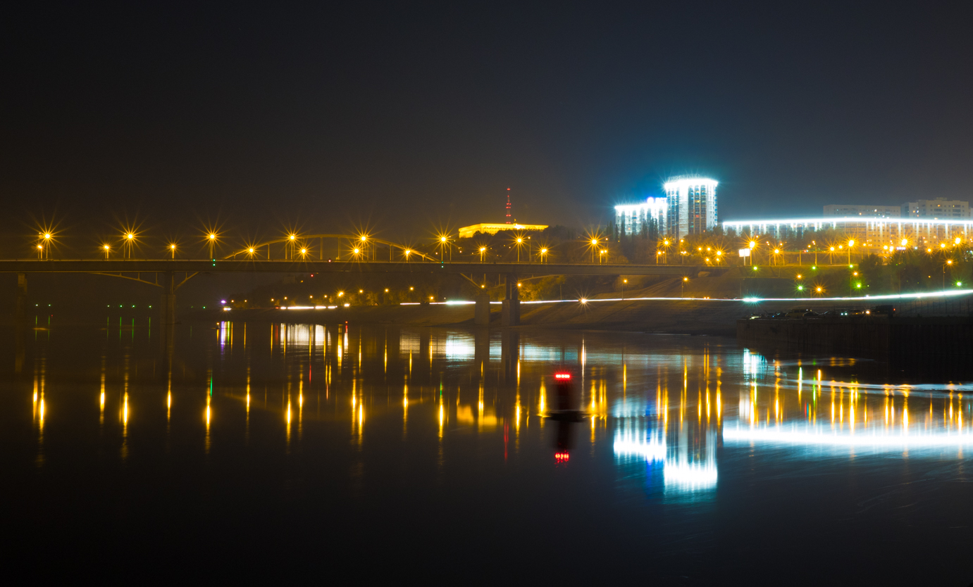 Ночная панорама на набережную реки Белой в Уфе, «Южные ворота» столицы.